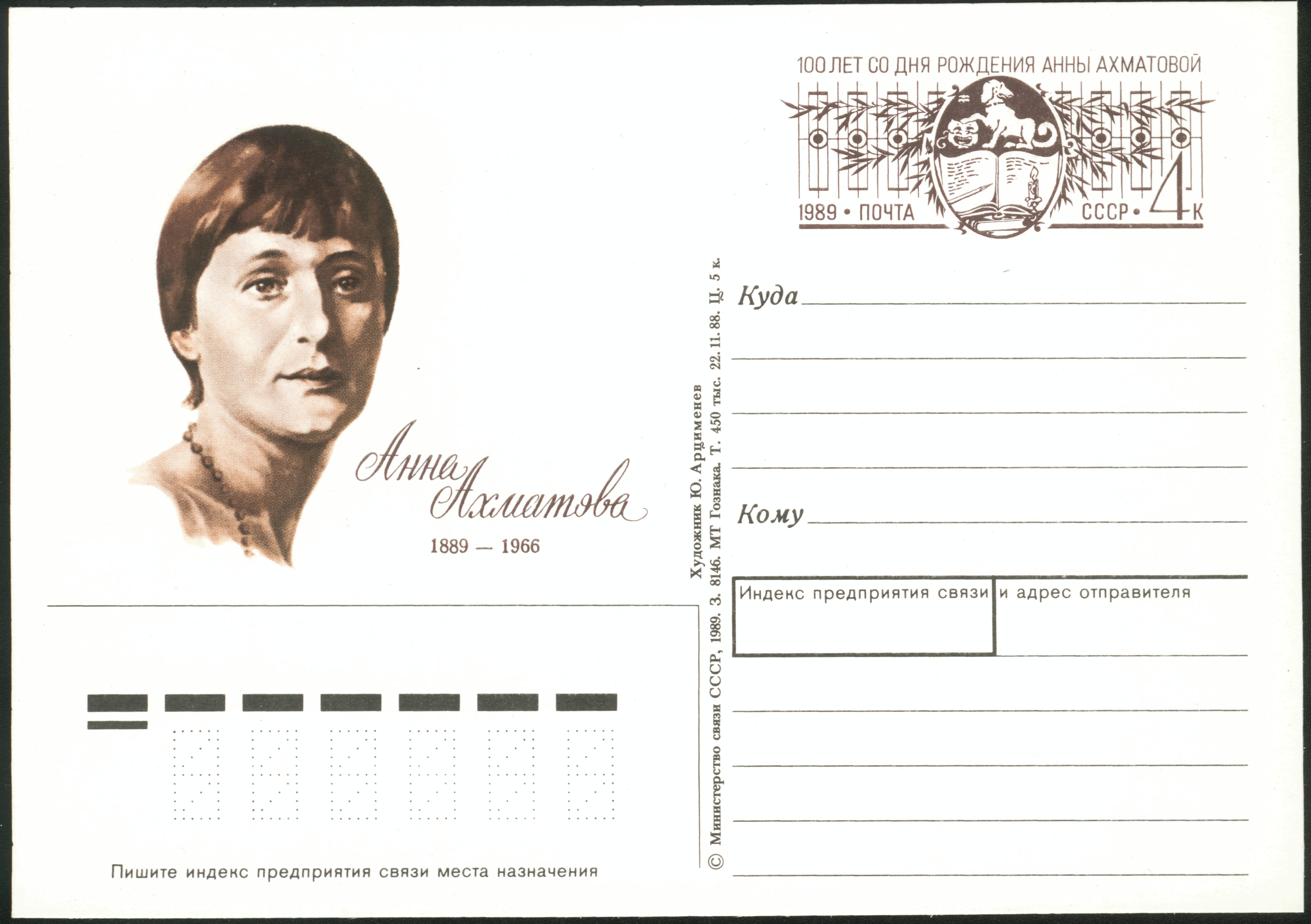 Anna Ahmatova, USSR original stamp, 1989 Анна Ахматова . Односторонняя почтовая карточка СССР с оригинальной маркой. 1989 год. Дата подписания в печать - 22 ноября 1988. Тираж 450 тысяч.